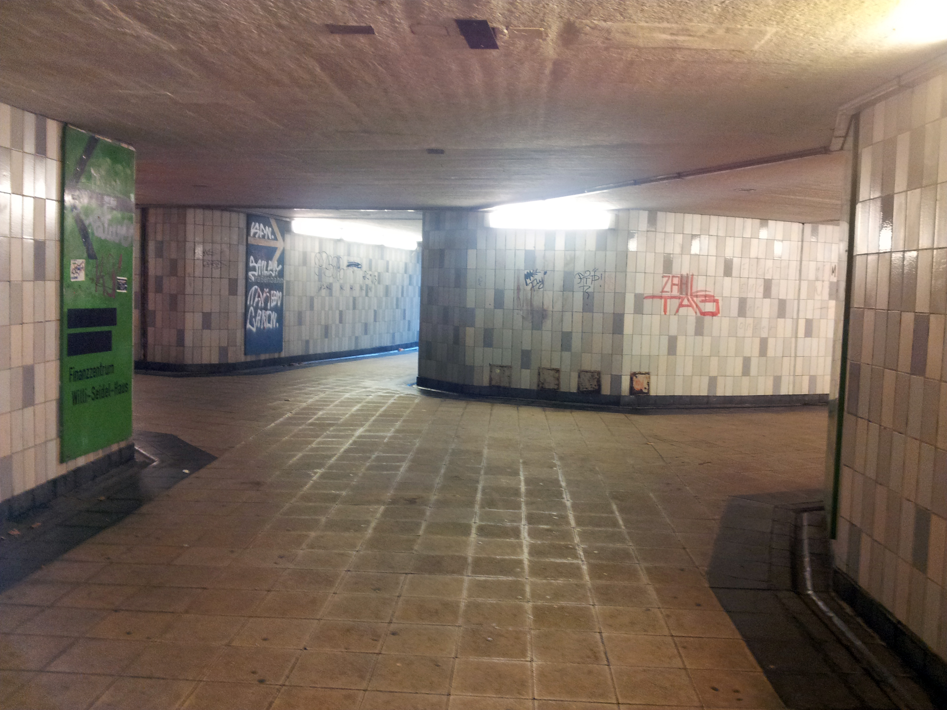 Unterführung Altmarkt Kassel